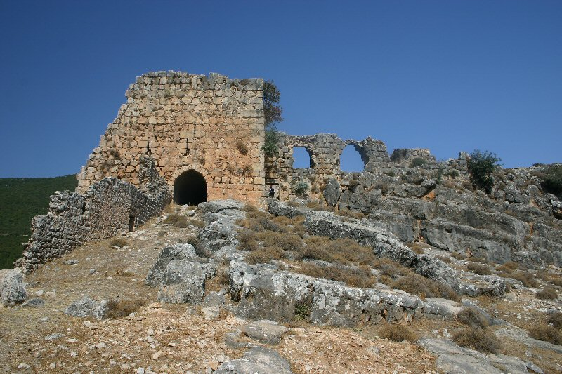 Bourzey Burg Quelle: eigenes Foto Datum: 2004 Lizenz: public domain